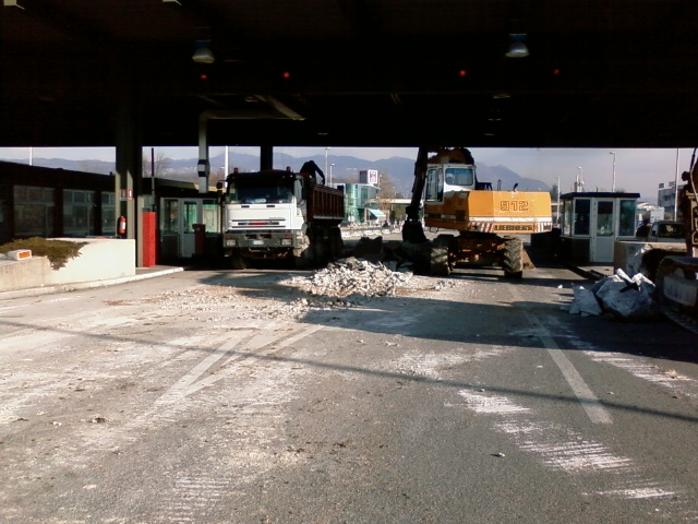 Rimozione delle cabine sul versante italiano del valico di frontiera internazionale di Sant'Andrea nel comune di Gorizia.